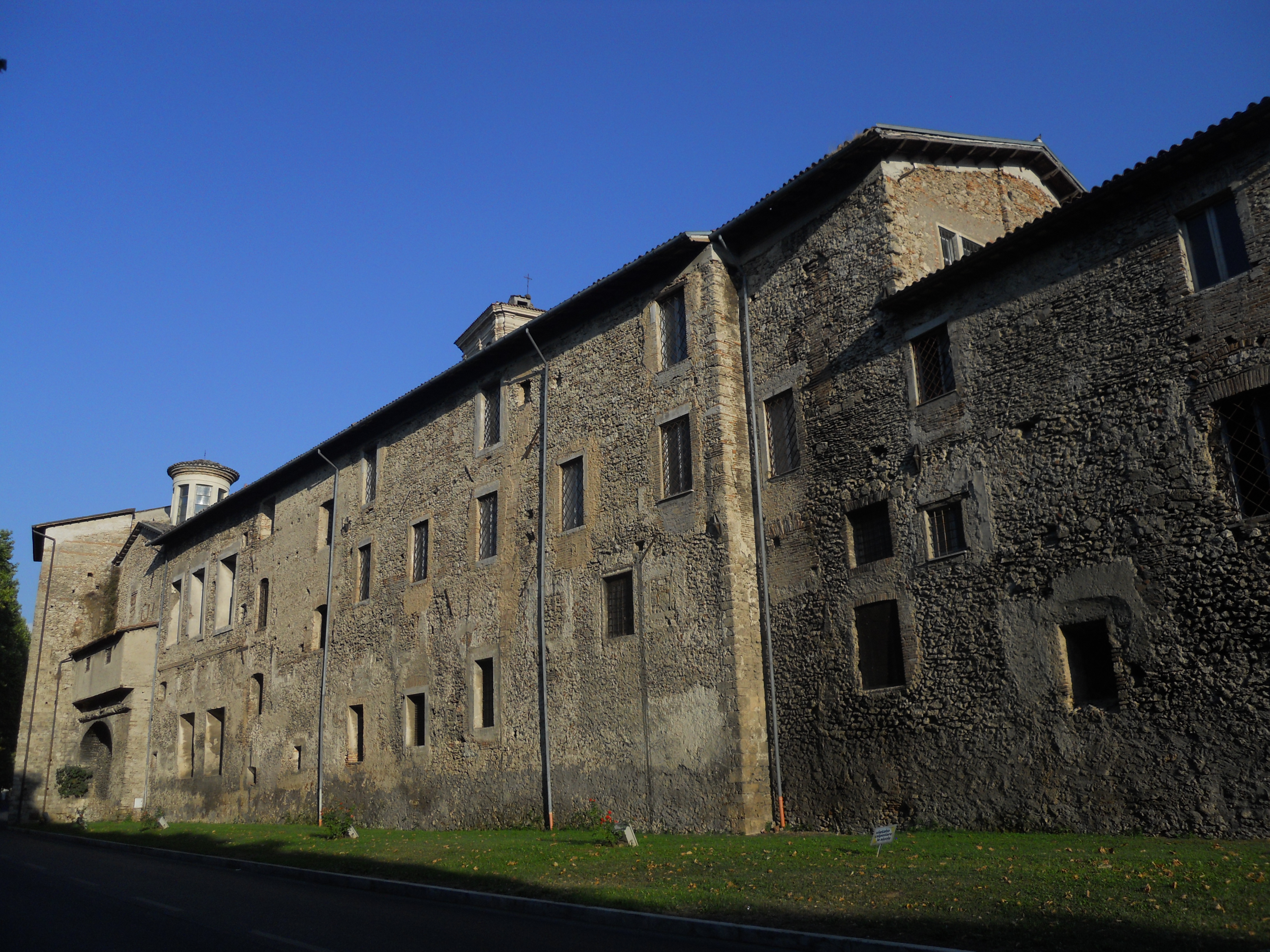 Mura di Rieti - adattate ad abitazioni, nel tratto prima dell'interruzione di porta d'Arci